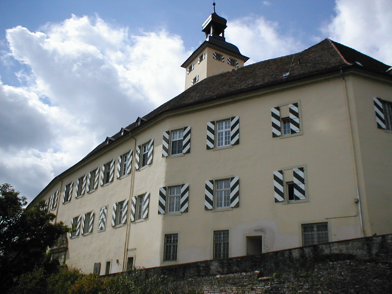 Schloss Horneck in Gundelsheim am Neckar